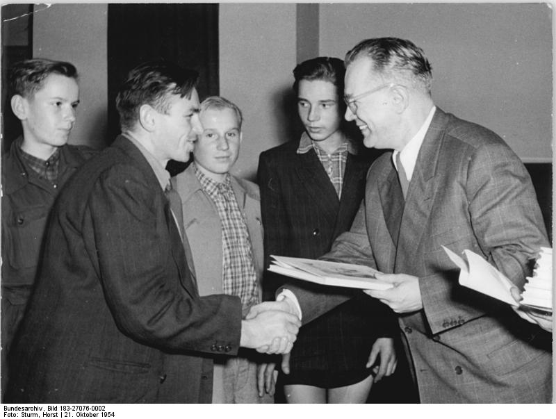 Zentralbild-Sturm Wjt-Mlk 2 Mot. 21.10.1954 Auszeichnung der besten Altstoffsammler Der Minister für Leichtindustrie der Deutschen Demokratischen Republik, Dr. Wilhelm Feldmann, zeichnete in einer Feierstunde im Ministerium für Leichtindustrie die Bezirkssieger im Schulwettbewerb 1954 - Sammlung nichtmetallischer Rohstoffreserven - aus. Die besten Einzelsieger aus den Bezirken der Deutschen Demokratischen Republik wurden zu dieser Feier eingeladen. In 10 Wochen wurde, durch diesen Schulwettbewerb ca. 6 Millionen kg nichtmetallischer Rohstoffe aus den Haushaltungen gesammelt. UBz: Auszeichnung der besten Sieger des Bezirkes Schwerin durch Minister Feldmann